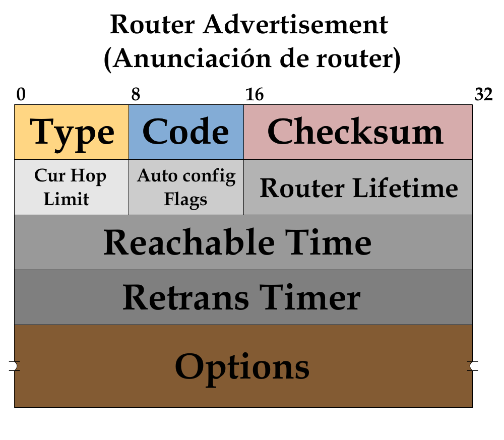 Formato de mensaje ICMPv6 Router Advertisement